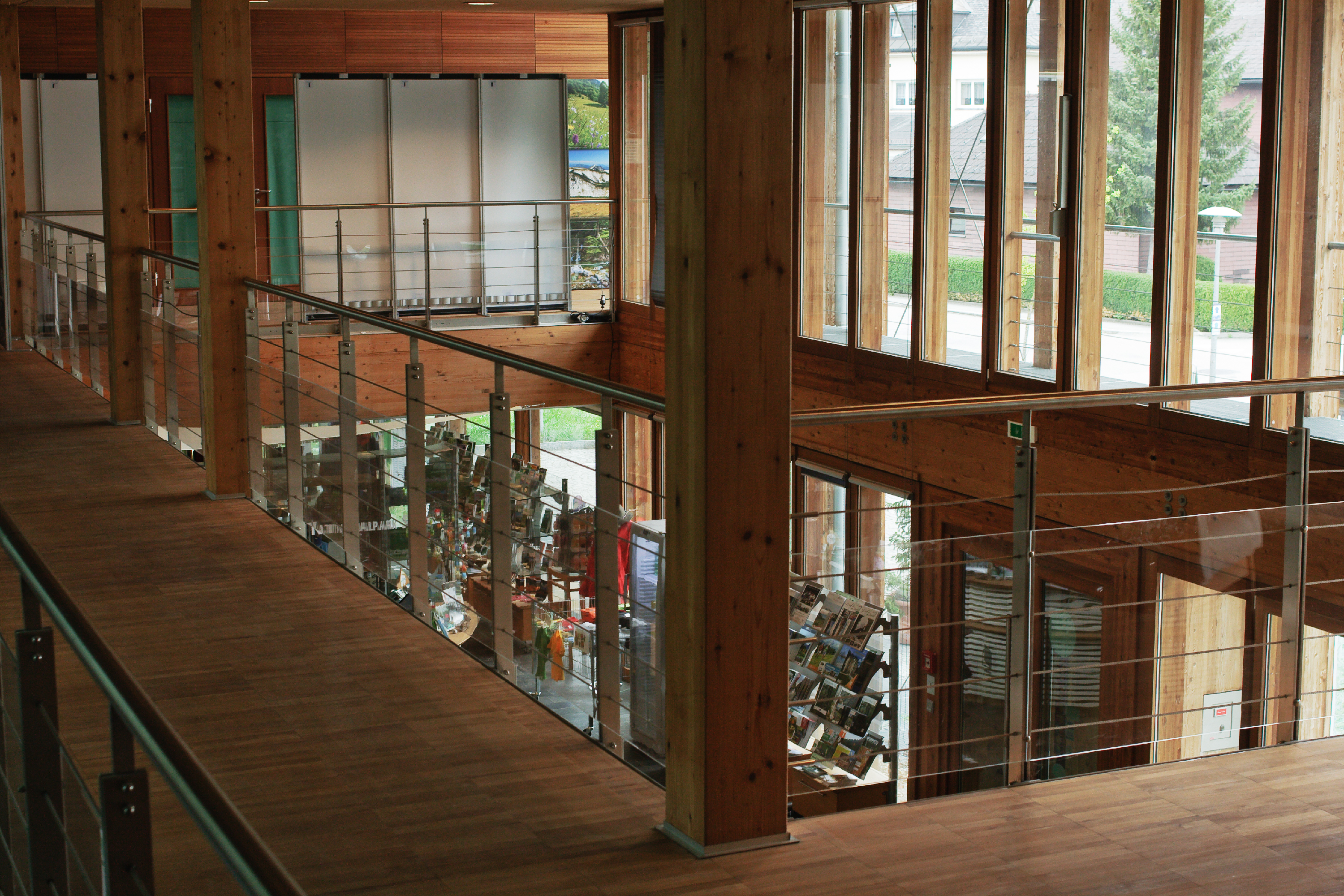 Nationalpark-Zentrum Molln: Blick vom ersten Stock ins Foyer